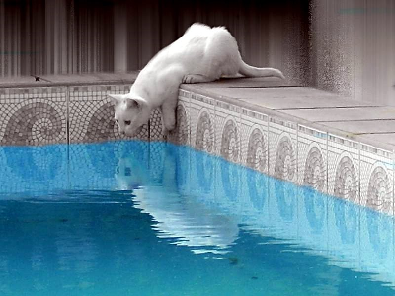 [1]Esta obra está licenciada sob uma Licença Creative Commons